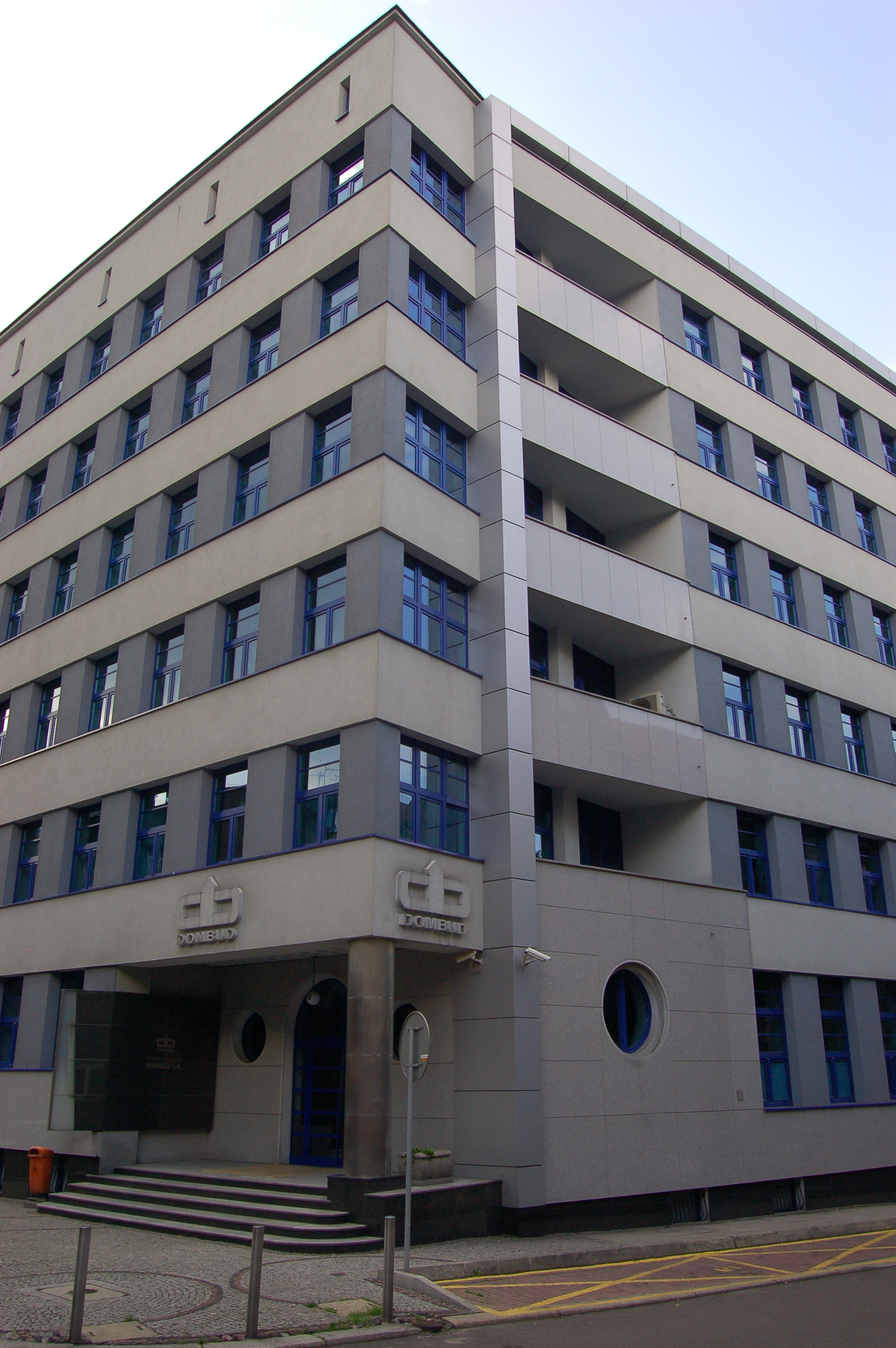 Katowice Drzymały.